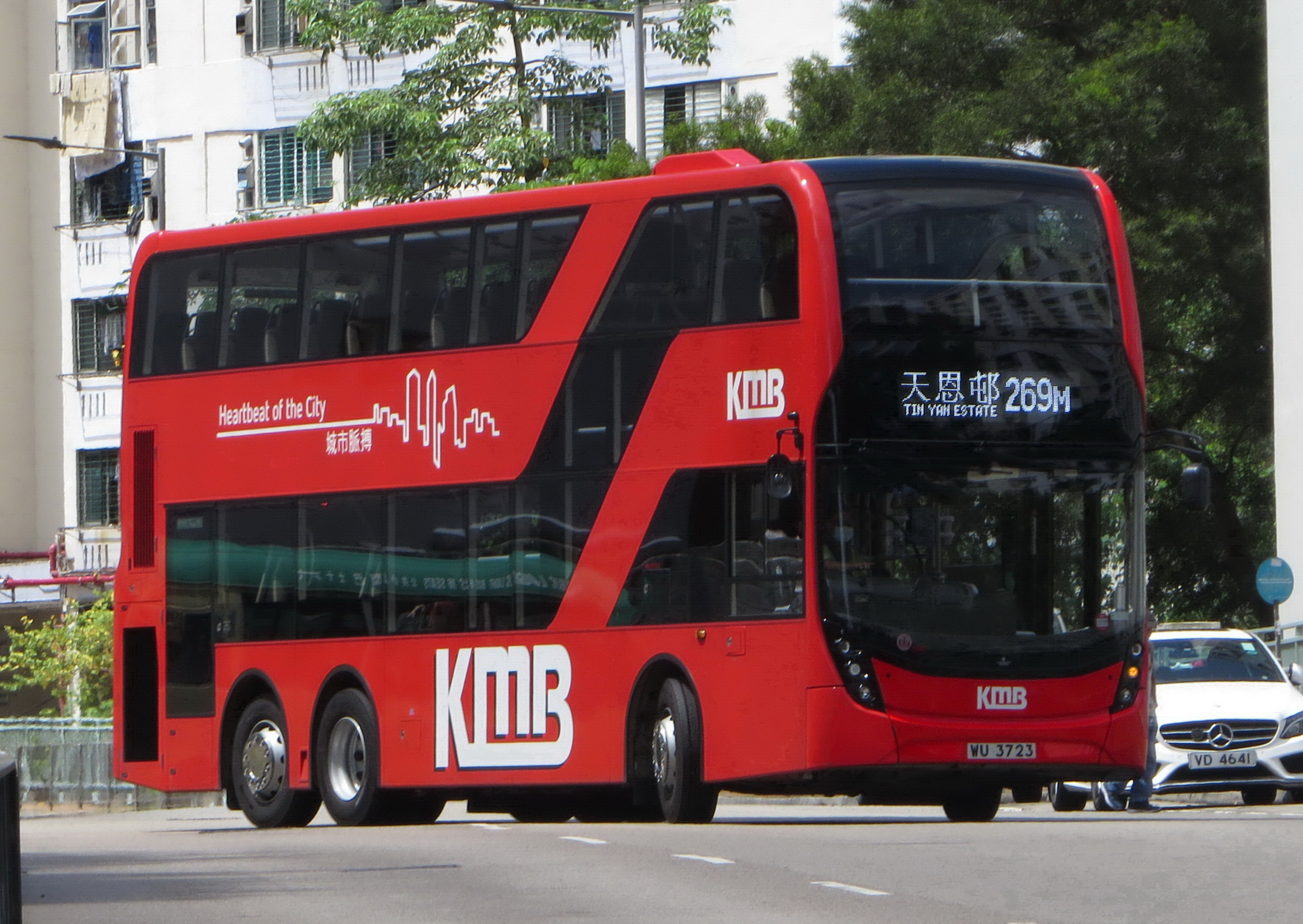 中文（中国大陆）: Trident E500 Turbo E6M7